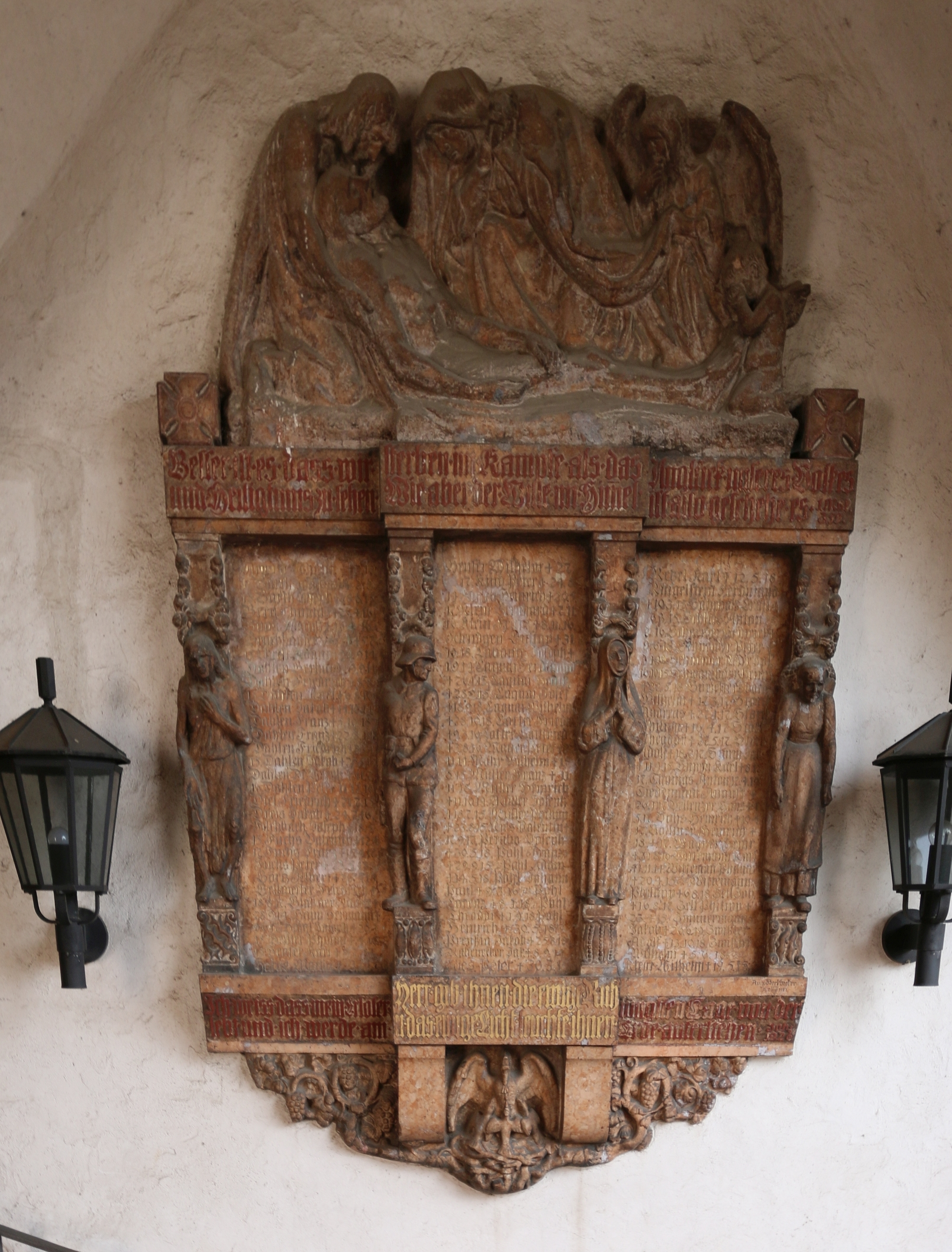 Lorch, Rheingau: Denkmalgeschütztes Gebäude Markt 4, katholische Pfarrkirche St Martin, erbaut ab dem 13. Jahrhundert - Gefallenenehrenmal von Professor August Weckbecker